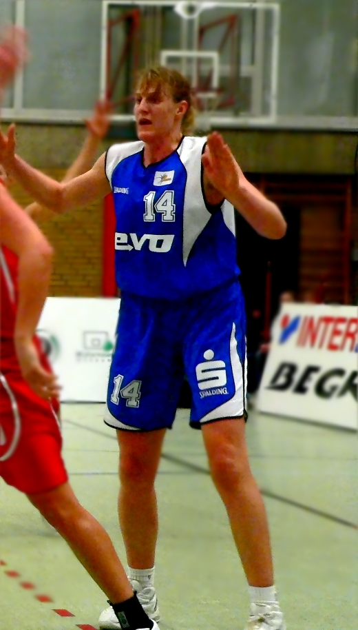 Marlies Askamp, ehemalige Basketballnationalspielerin